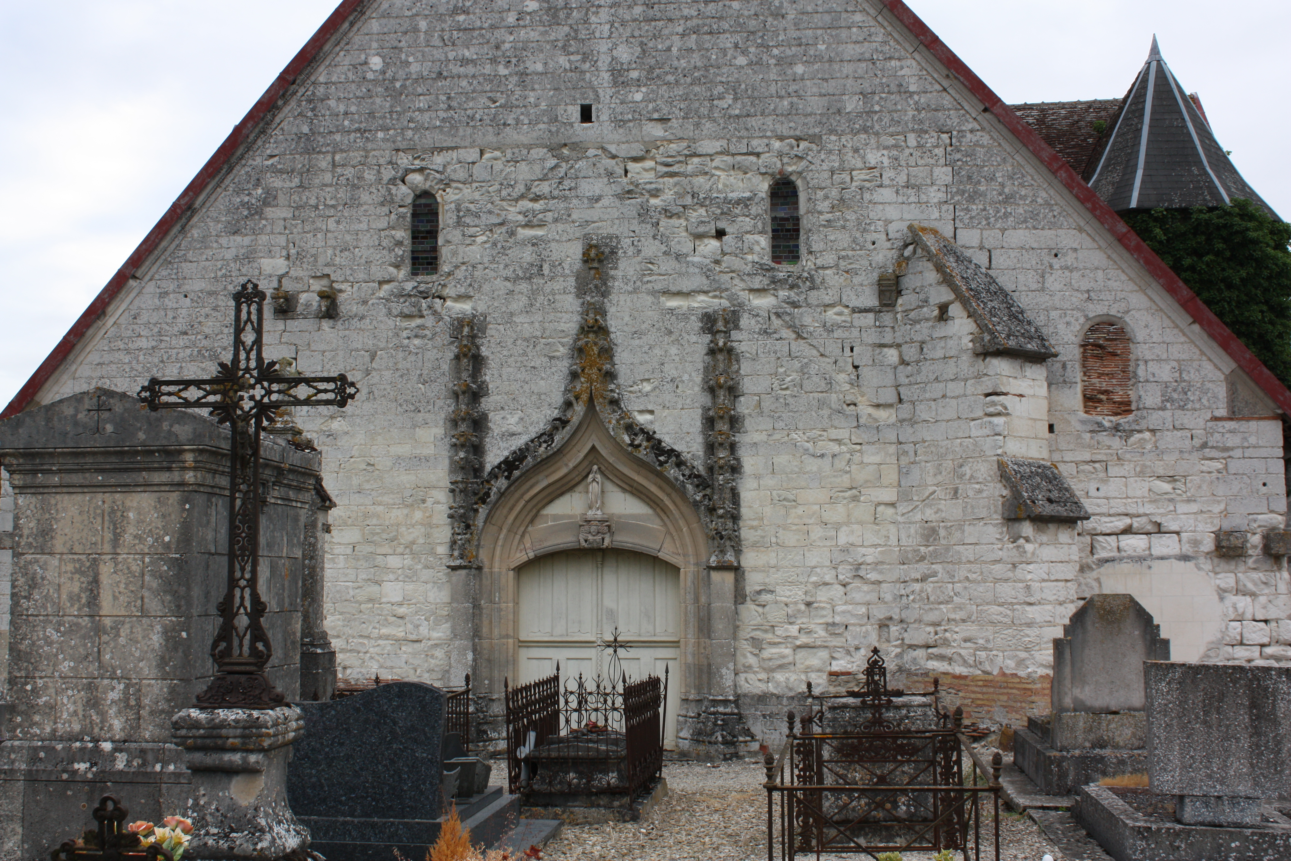 Aubeterre église vue de l'Ouest